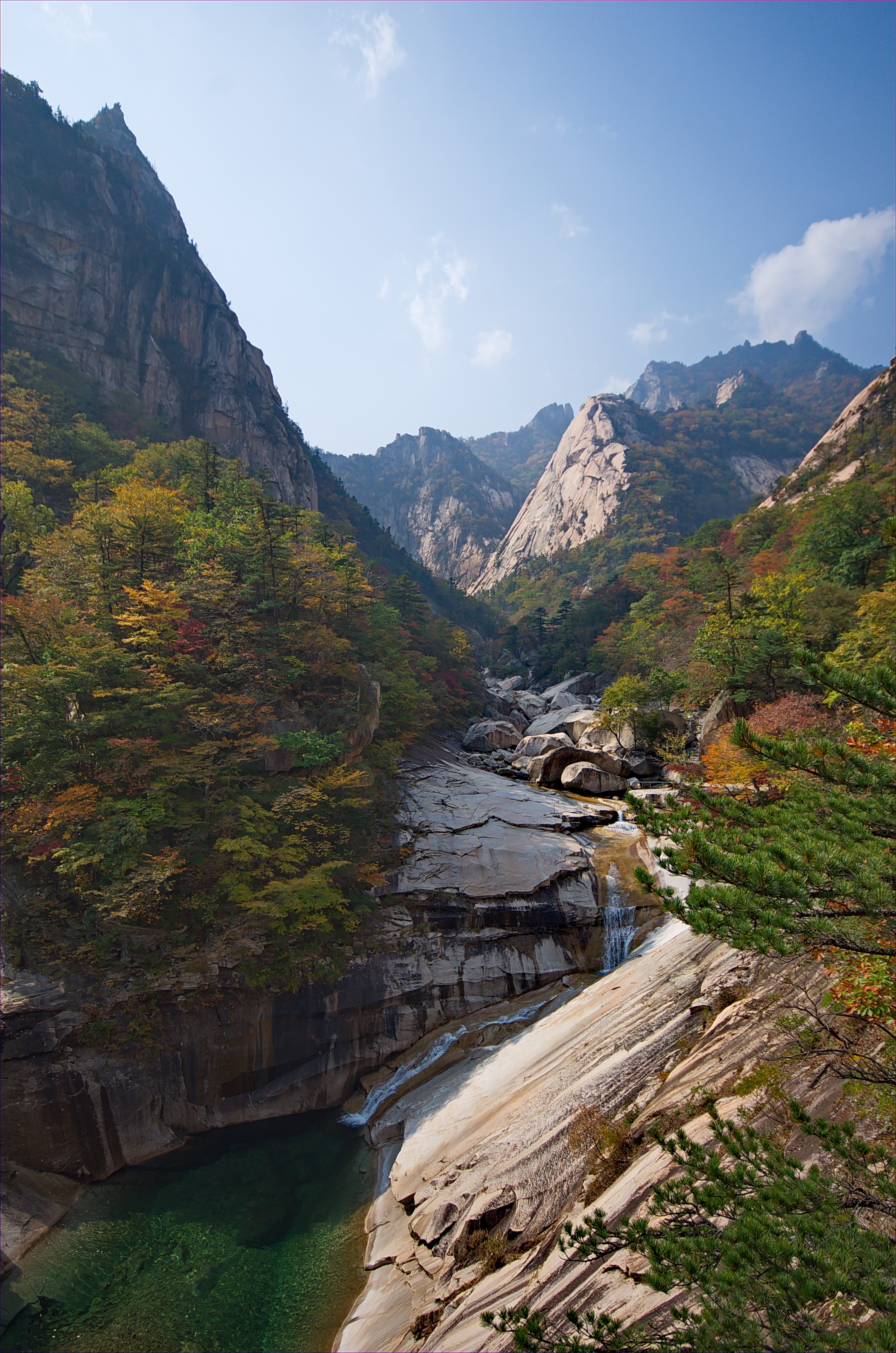 Nordkorea 2015 - Kumgang Gebirge